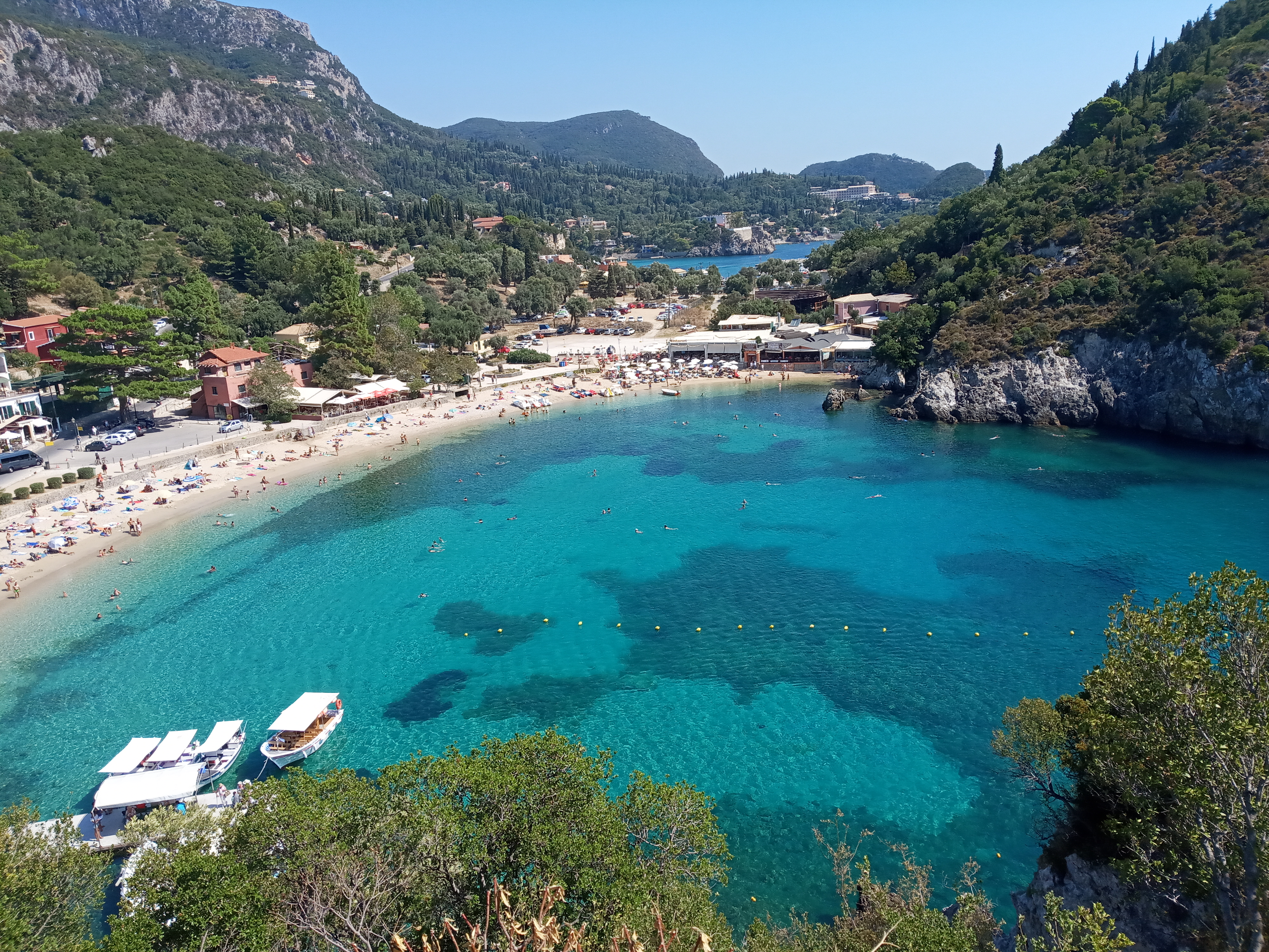 Пляж селища Паліокастріца острів Керкіра